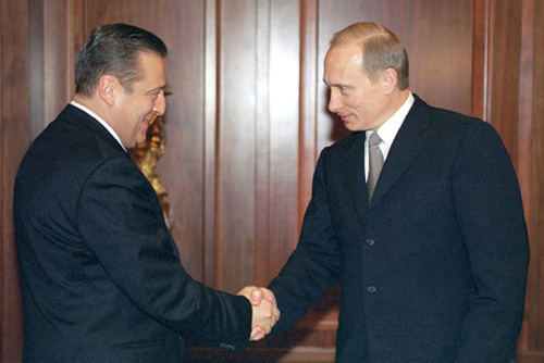 МОСКВА, КРЕМЛЬ. С художественным руководителем Театра эстрады Геннадием Хазановым.